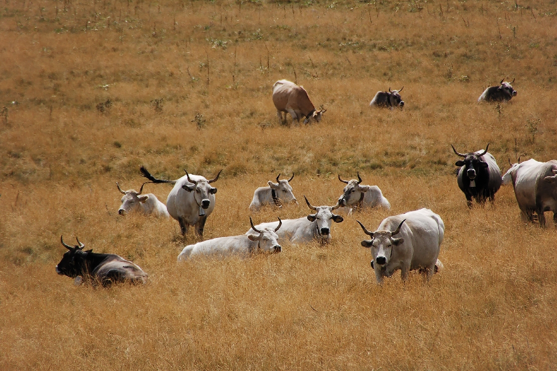 Campo Imperatore 2011